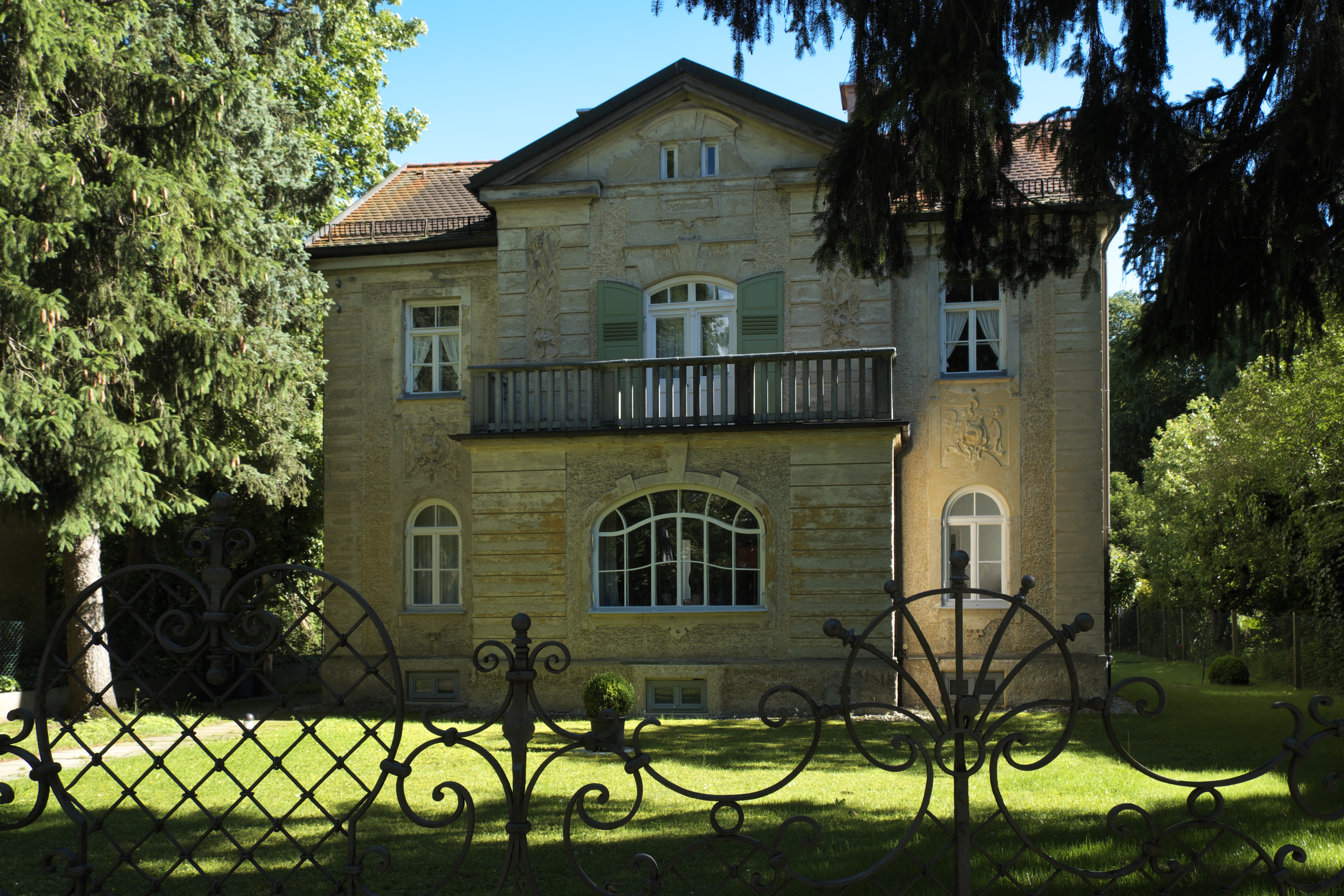 Villa in der Marsopstraße 16 in Obermenzing im Stadtbezirk Pasing-Obermenzing in München (Bayern/Deutschland)